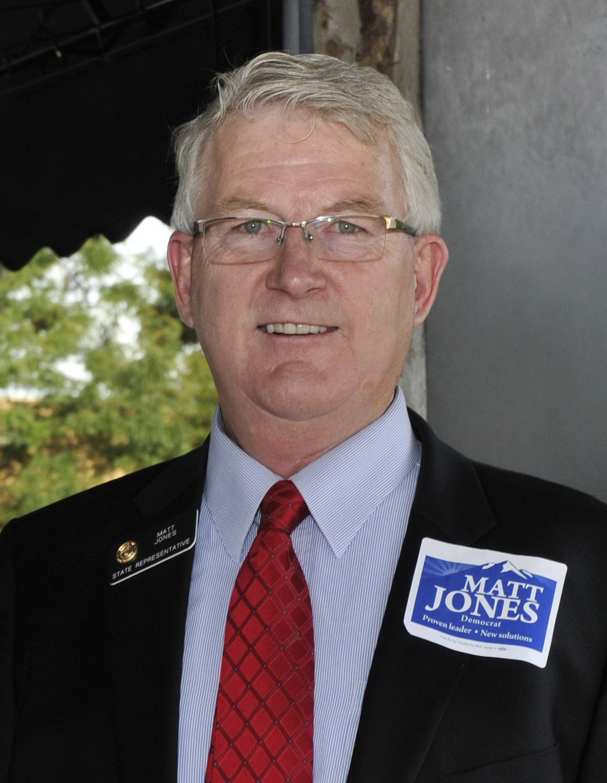 Colorado State Senator Matt Jones